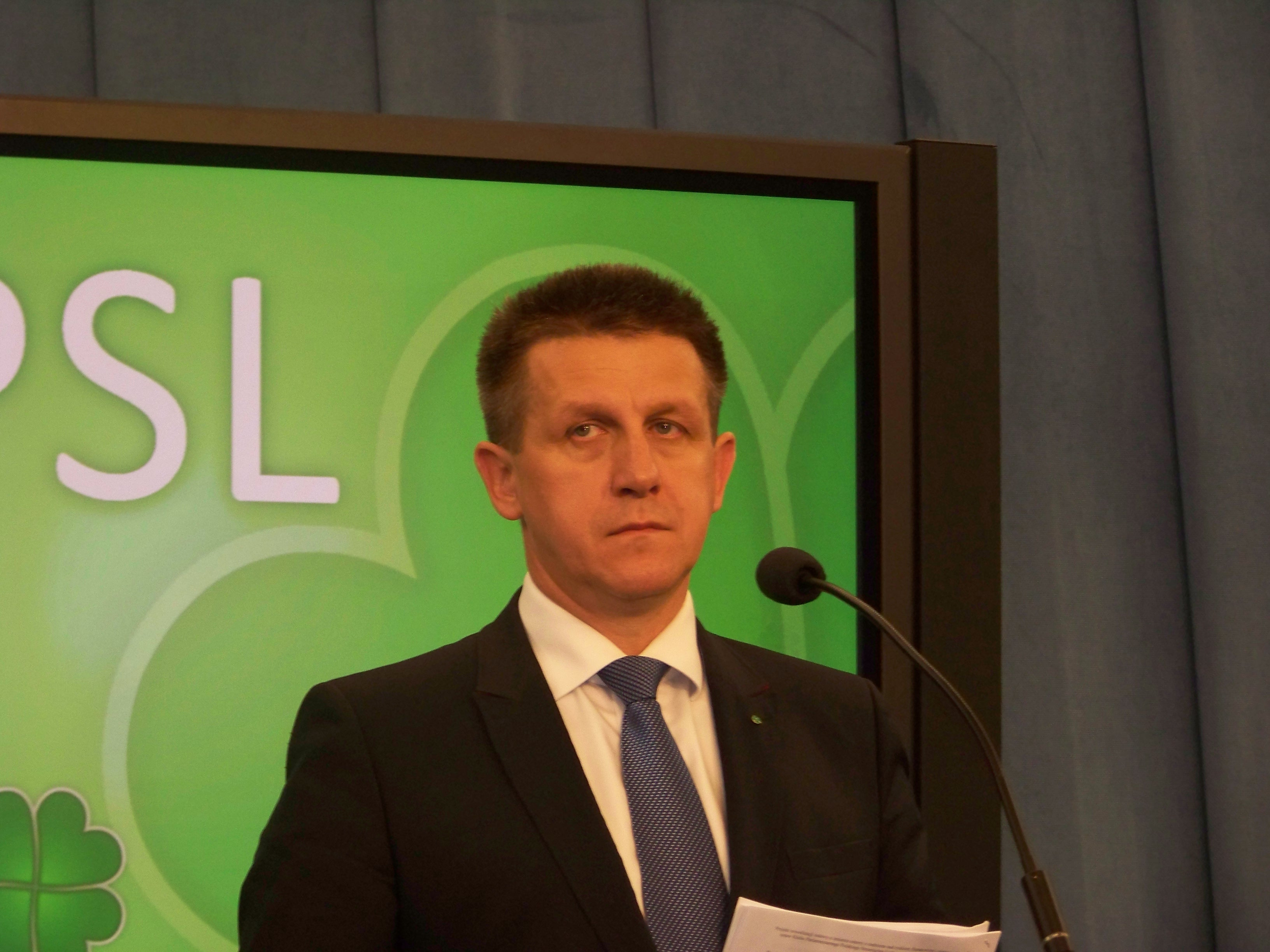 Sejm, konferencja prasowa. Jan Bury.